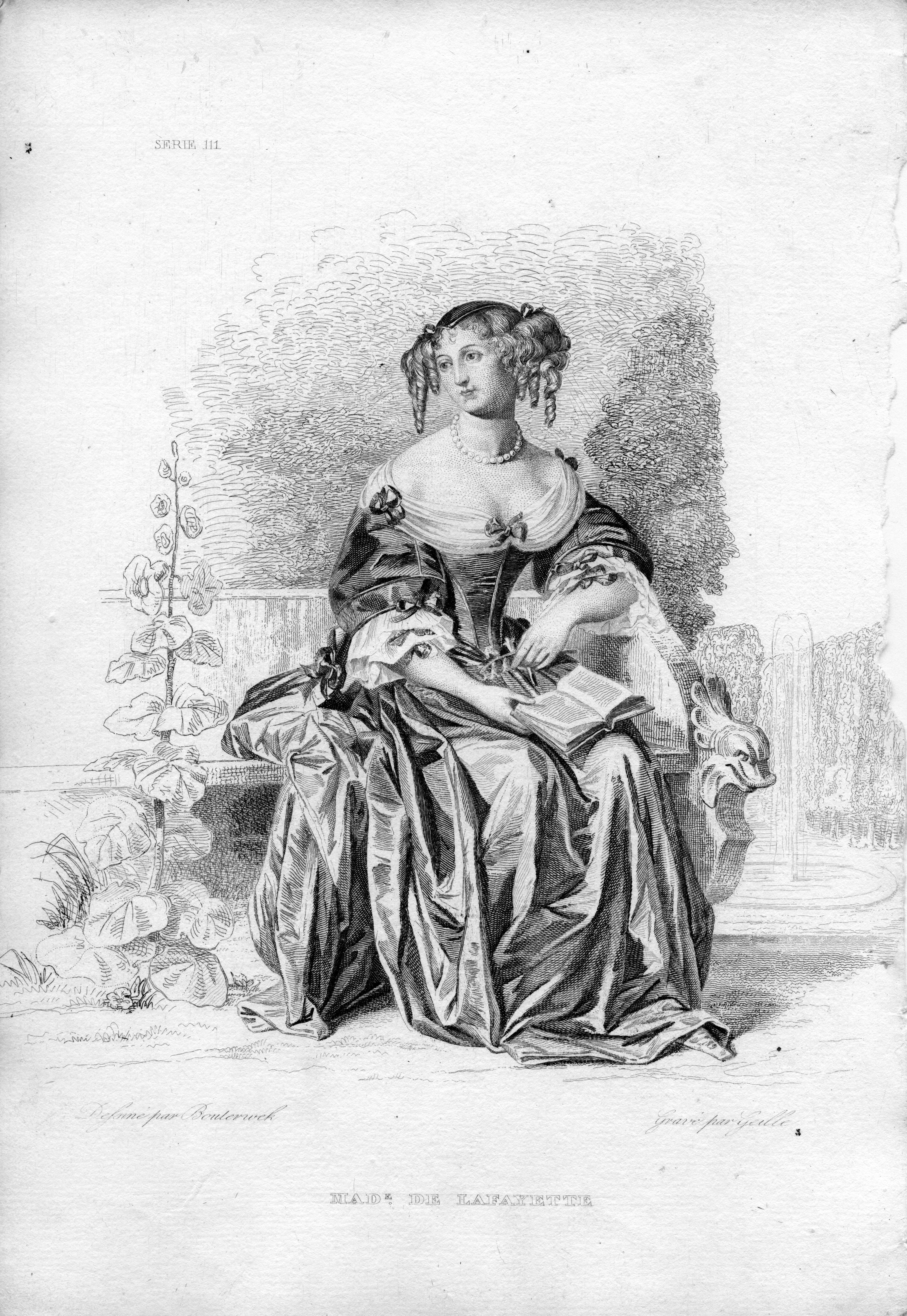 portrait gravé